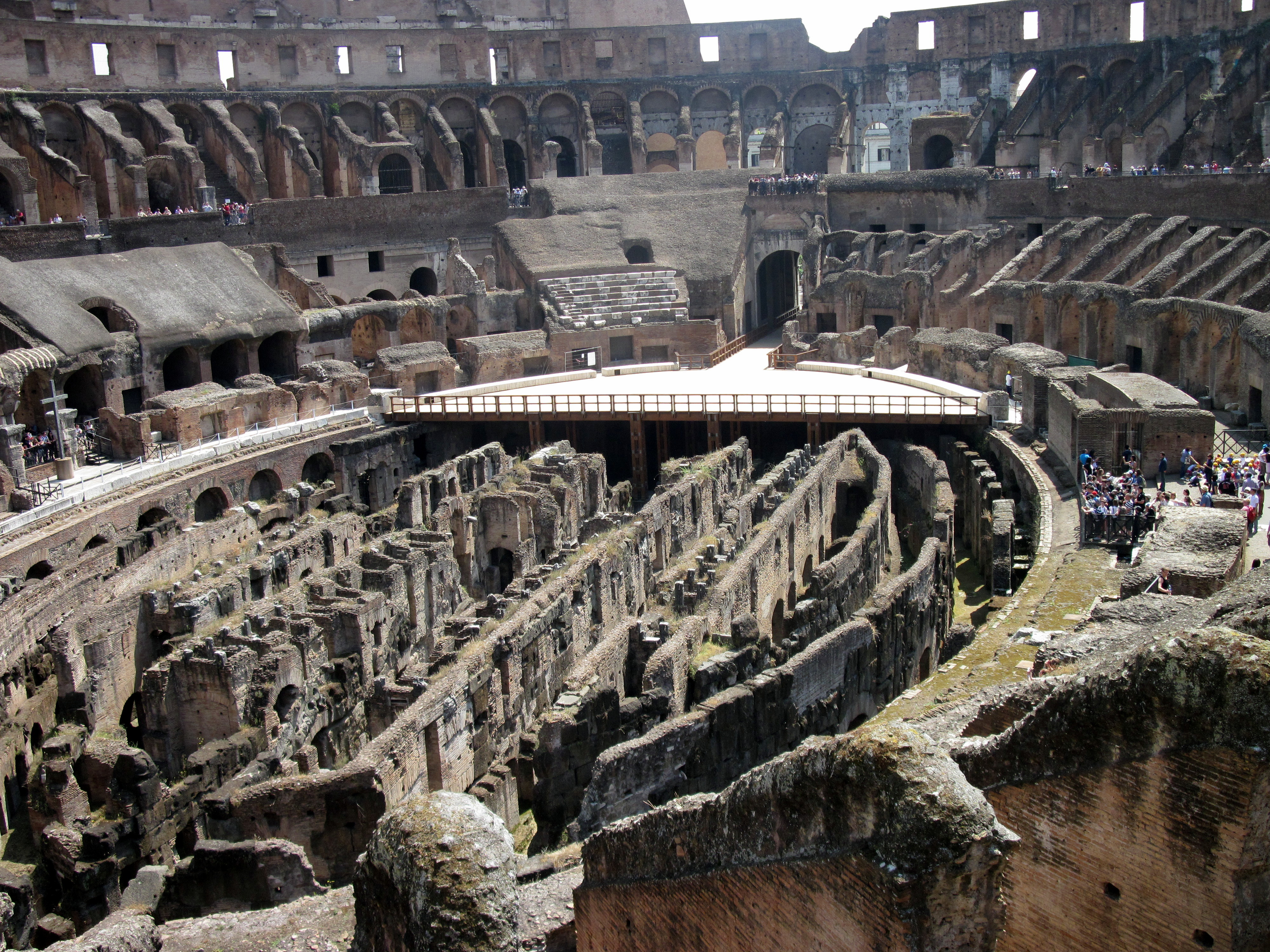 Колизей внутри